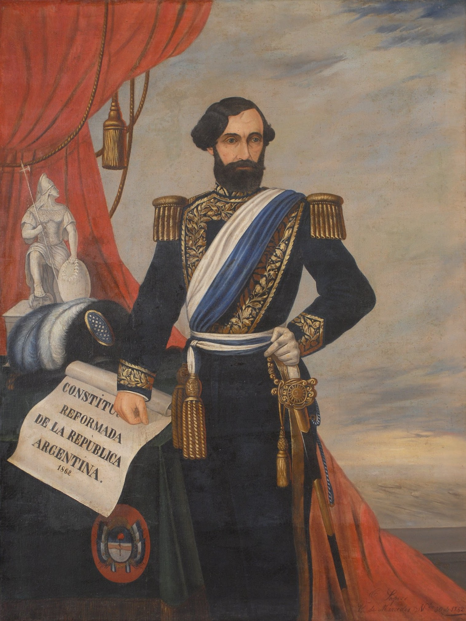 Figura del general Mitre de frente a los 40 años aproximadamente con barba y mirada hacia el ángulo inferior izquierdo. Viste uniforme de gala de paño azul-negro con entorchados, charreteras y faja celeste y blanca terminadas con dos bordas doradas y flecos. Sobre el pecho lleva banda presidencial bicolor celeste y blanca de hombro izquierdo a flanco derecho. Su mano izquierda apoya en la cintura sobre el mango de su espada, de la que cuelga una borla dorada y la derecha apoya cerrada en un puño sobre la mesa en la que hay un ejemplar de la Constitución, un bicornio y una escultura. Fondo cortinado rojo con borlas doradas y detrás, cielo azul. Donación: Sra. de Risso Patrón.